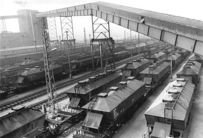 Wismar, Güterwaggons, Kali-Verladeanlage ADB-ZB-Sindermann 23.2.88-mx Bez. Rostock: Über den Seehafen Wismar wird der größte Teil der Kaliausfuhr der DDR realisiert. Zielzüge aus den Kaliwerken fahren den Hafen direkt an. Hier werden sie mit Hilfe automatisierter Entladeanlagen geleert. Über Föderbandsysteme wird dann das Düngemittel zu den Frachtschiffen transportiert.